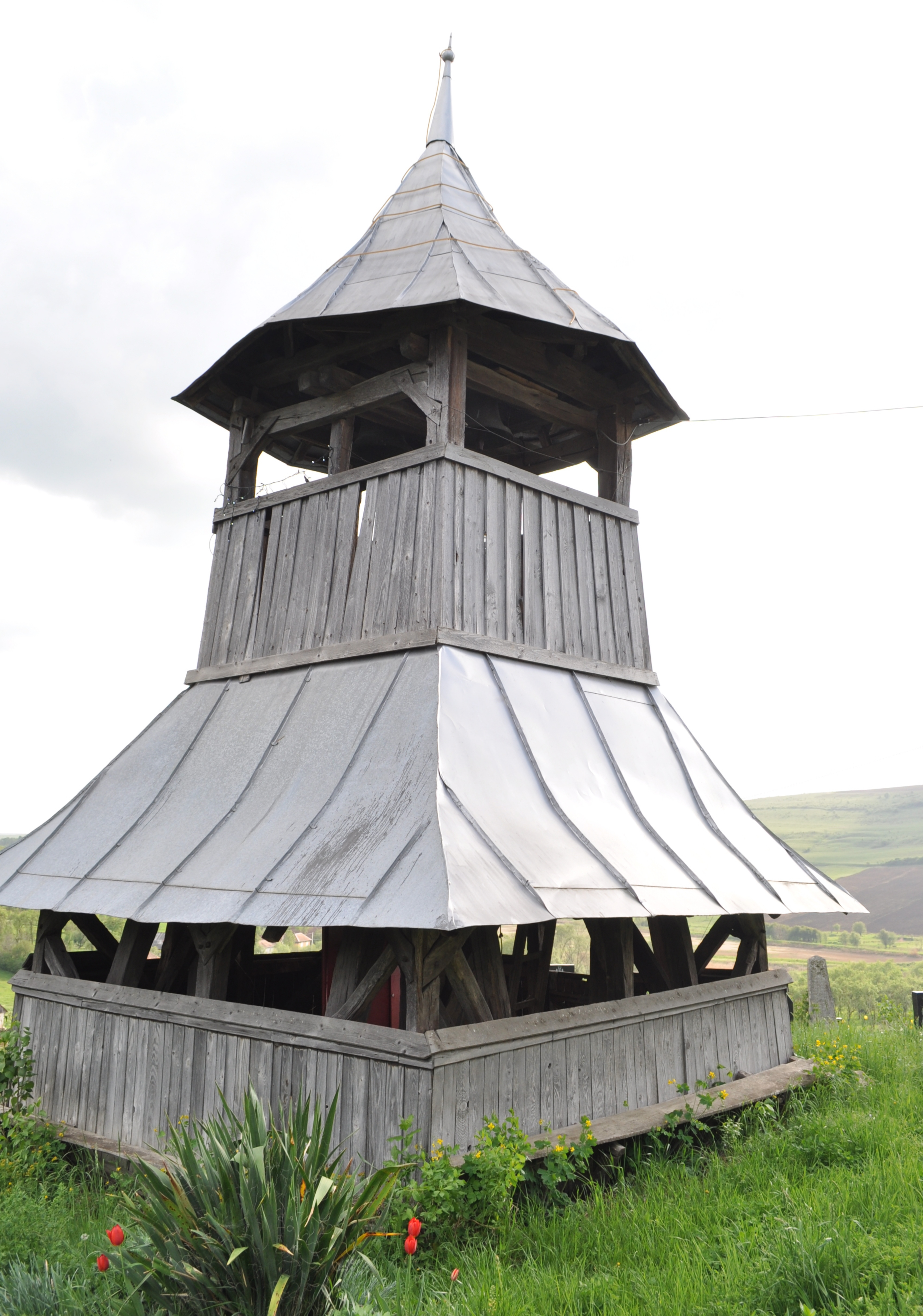 Turn clopotnița din lemn, sat Strugureni; comuna Chiochiș 02